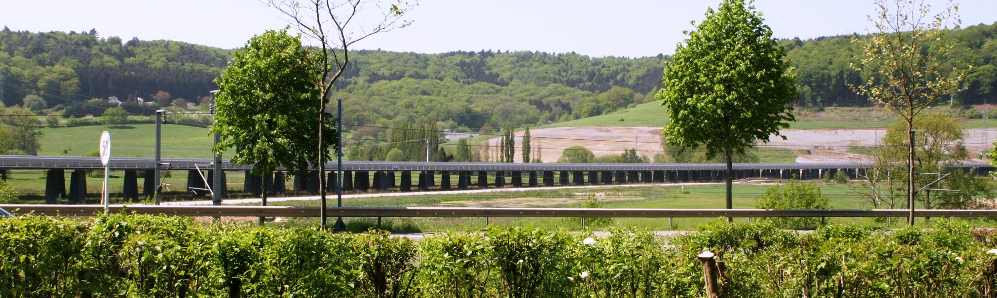 Viaduc vu Luerenzweiler. Kategorie:Brécken zu Lëtzebuerg